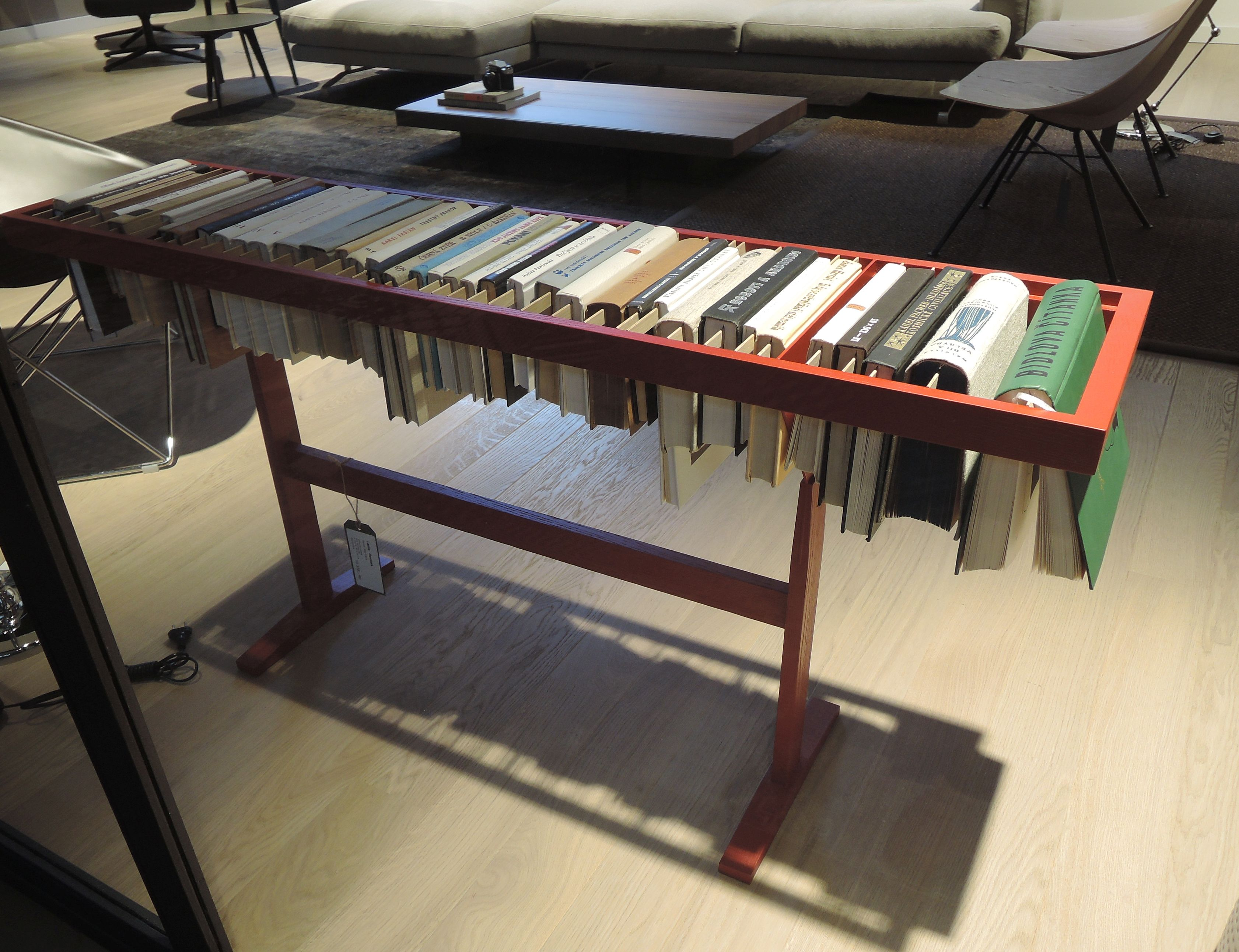 Knihovnička se závěsem na knihy, Praha 2018